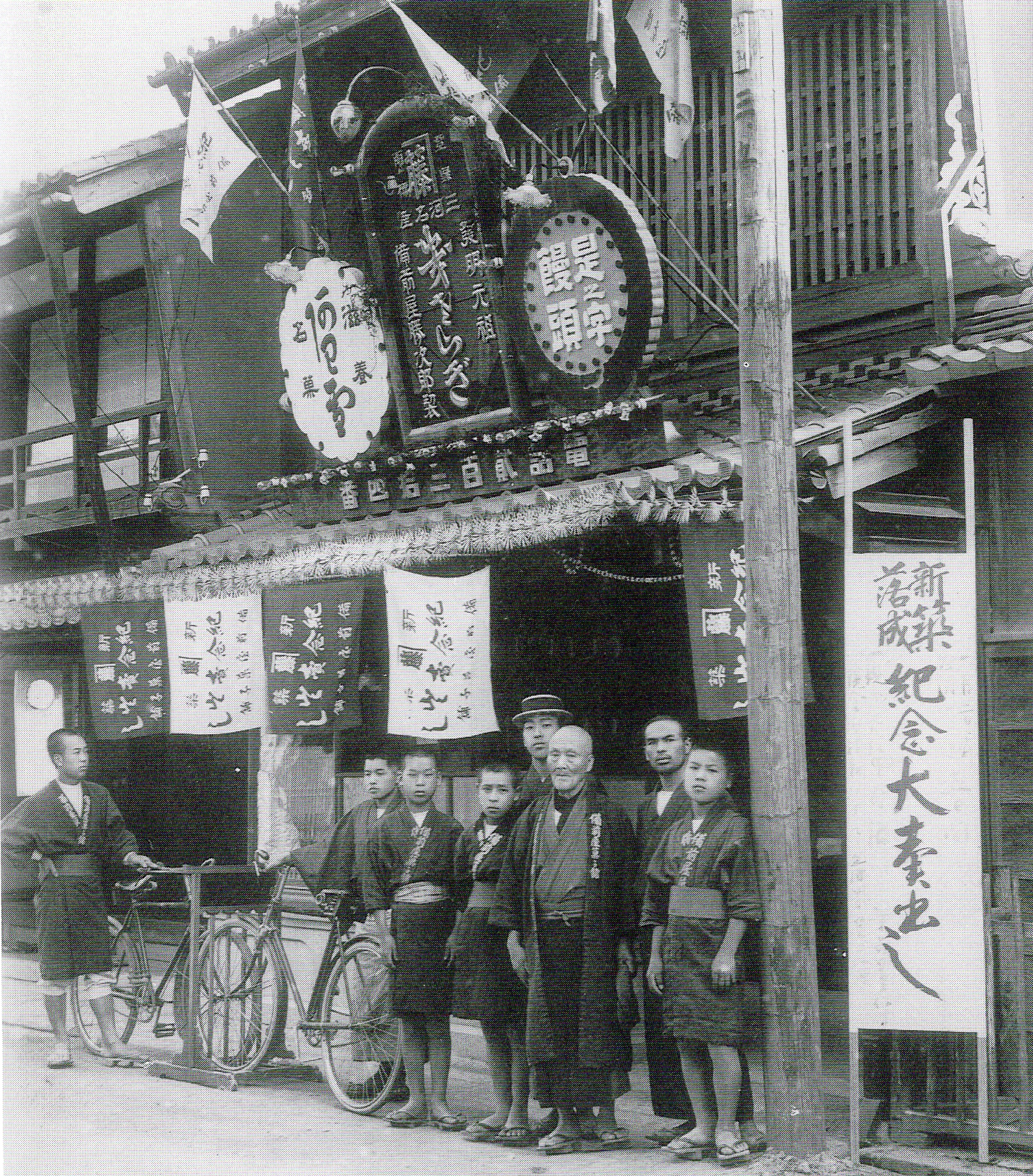 和菓子屋の備前屋。1912年の新築落成の記念大売り出しの写真。カンカン帽をかぶっているのが六代目の主人。